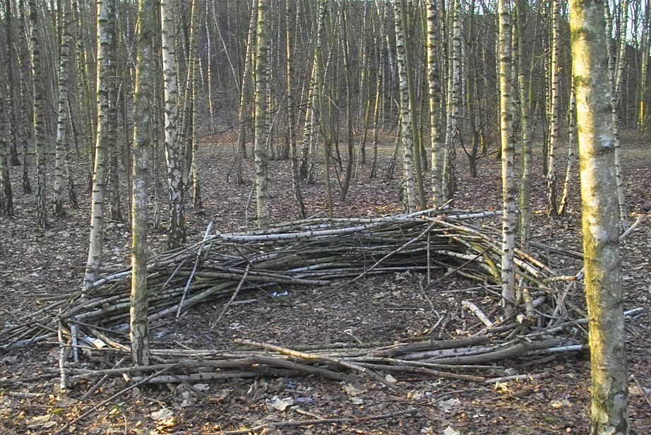 Bildbeschreibung: Eine Arbeit des Naturkünstlers Herman Prigann auf der Halde Rheinelbe in Gelsenkirchen-Ückendorf. Fotograf: Jesse Krauß Datum: 2006